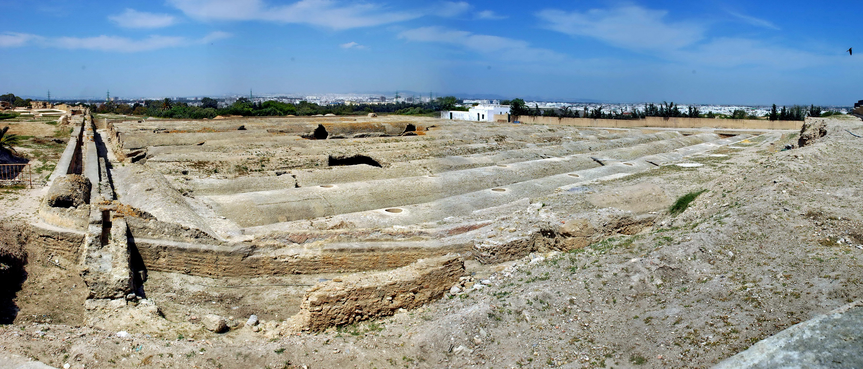 Citernes romaines de La Malga à Carthage